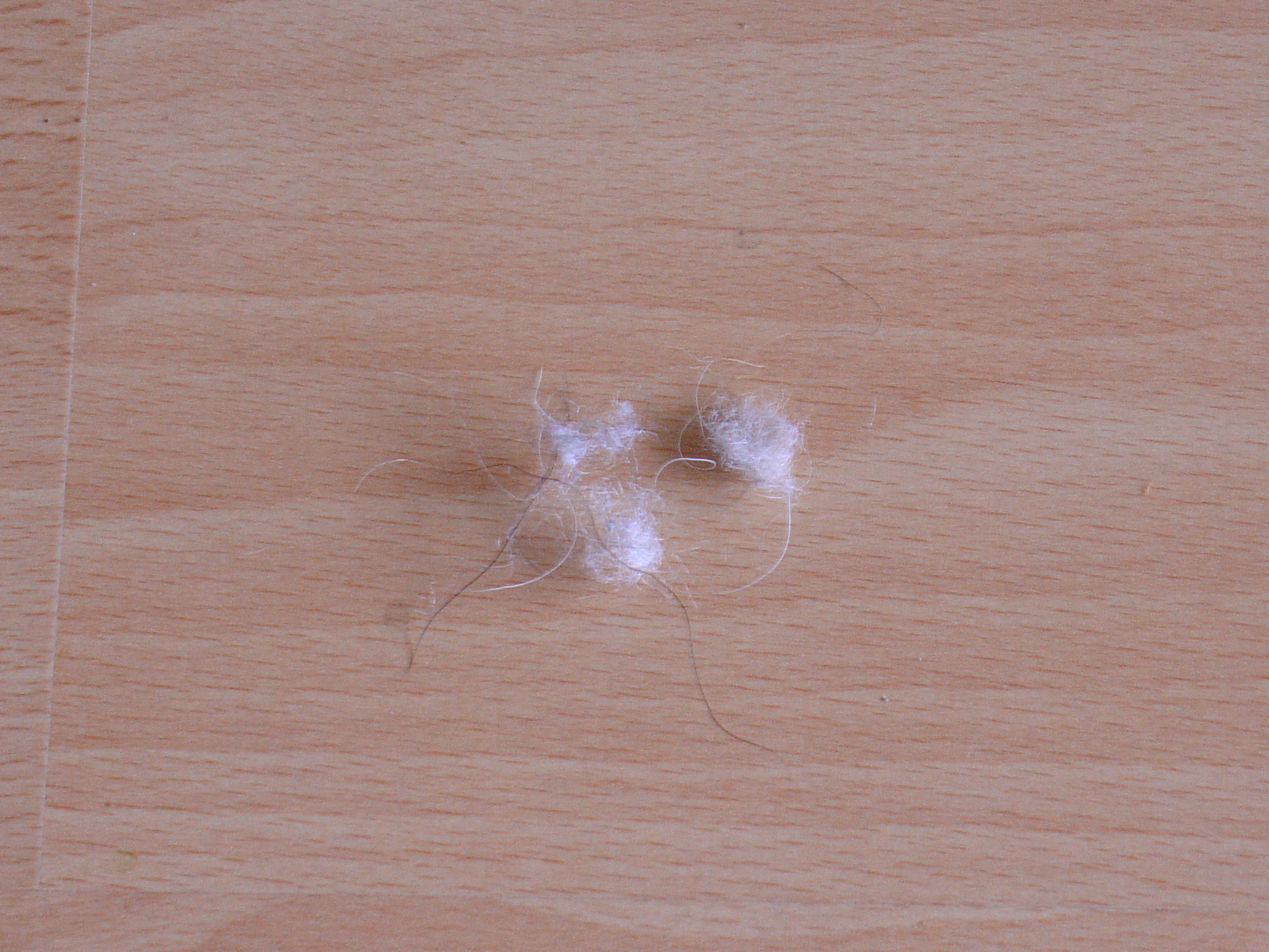 Wollmaus